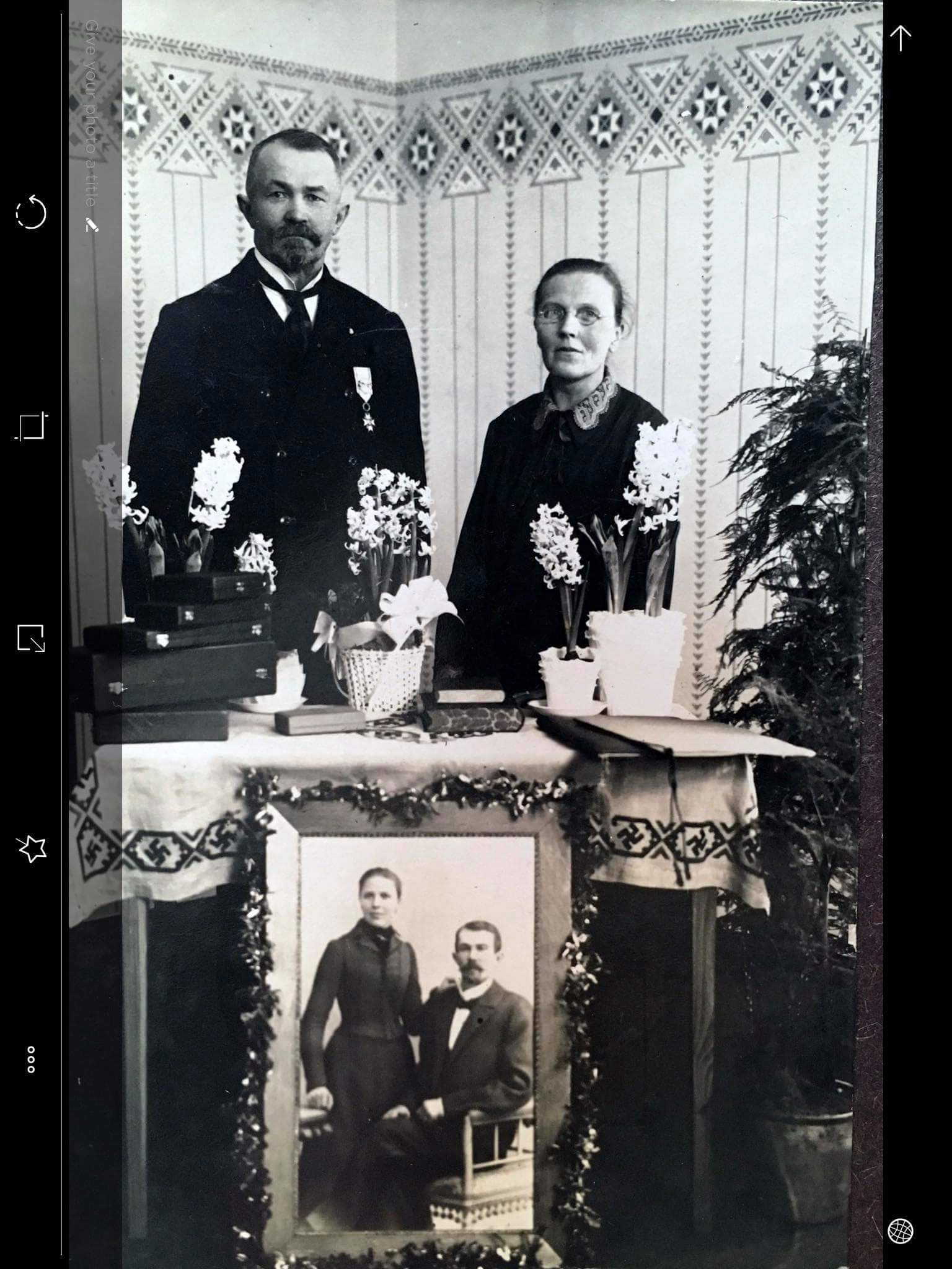 Kārlis Zeltiņš ar sievu Matildi. Ģimenes portrets. Foto no personīgā arhīva.